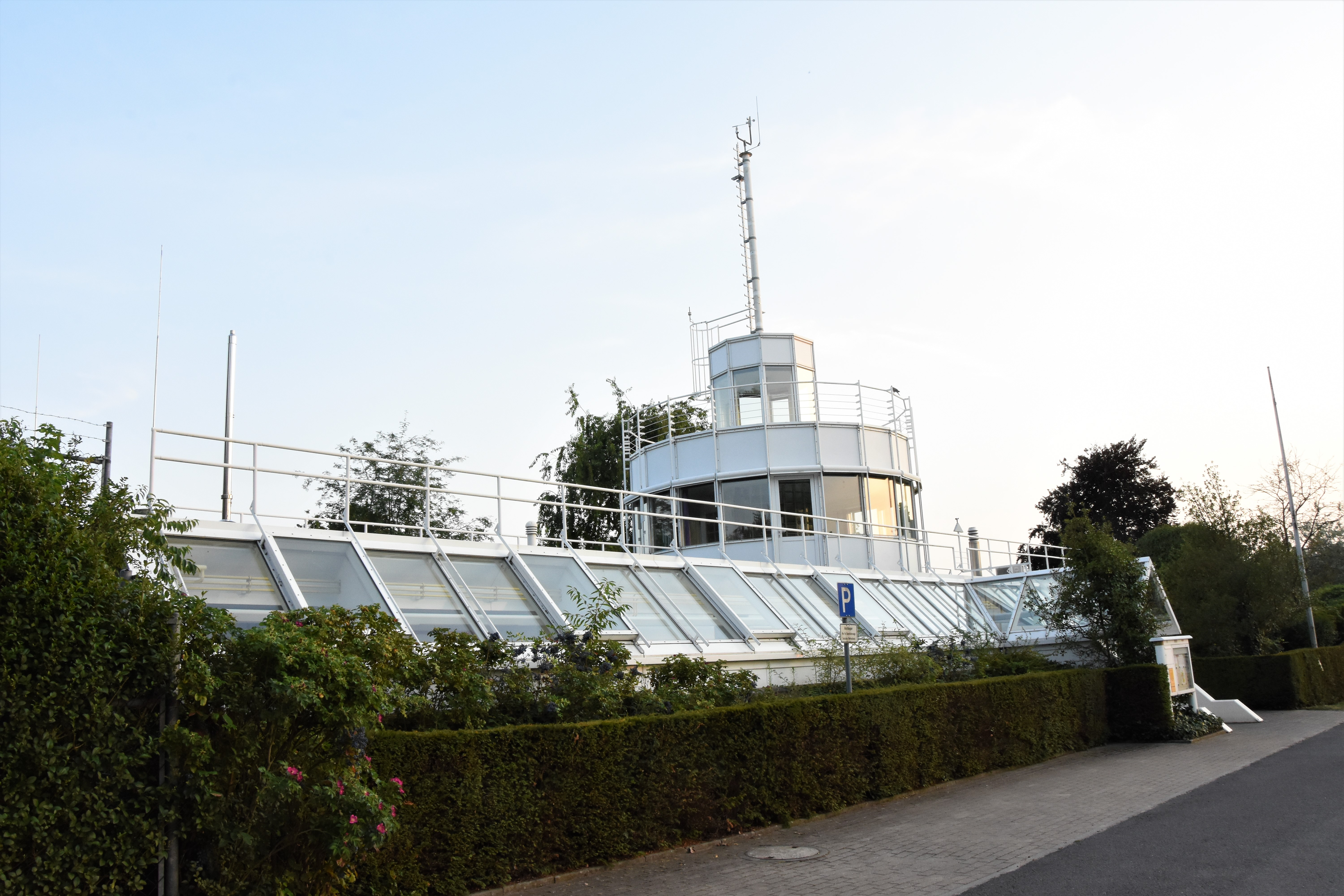 DWD-Wetterstation Lingen am 25. Juli 2019. Ungefähr 2 Stunden nach Messen des Temperaturrekords von 42,6 °C.